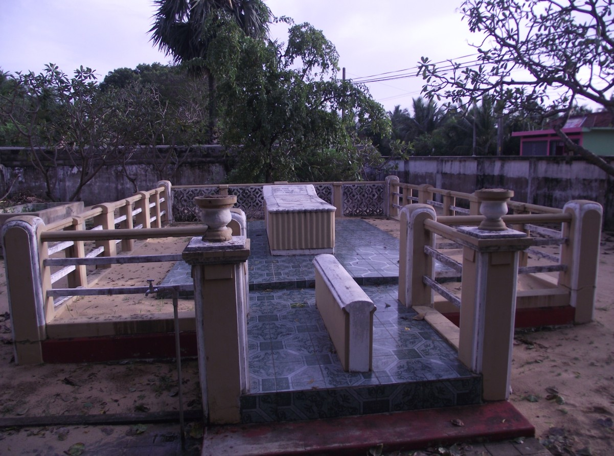 கிழக்கிலங்கையின் மட்டகளப்பு மாவட்டத்தின் கல்லடியில் உள்ள முத்தமிழ் வித்தகர் சுவாமி விபுலானந்தர் சமாதி.